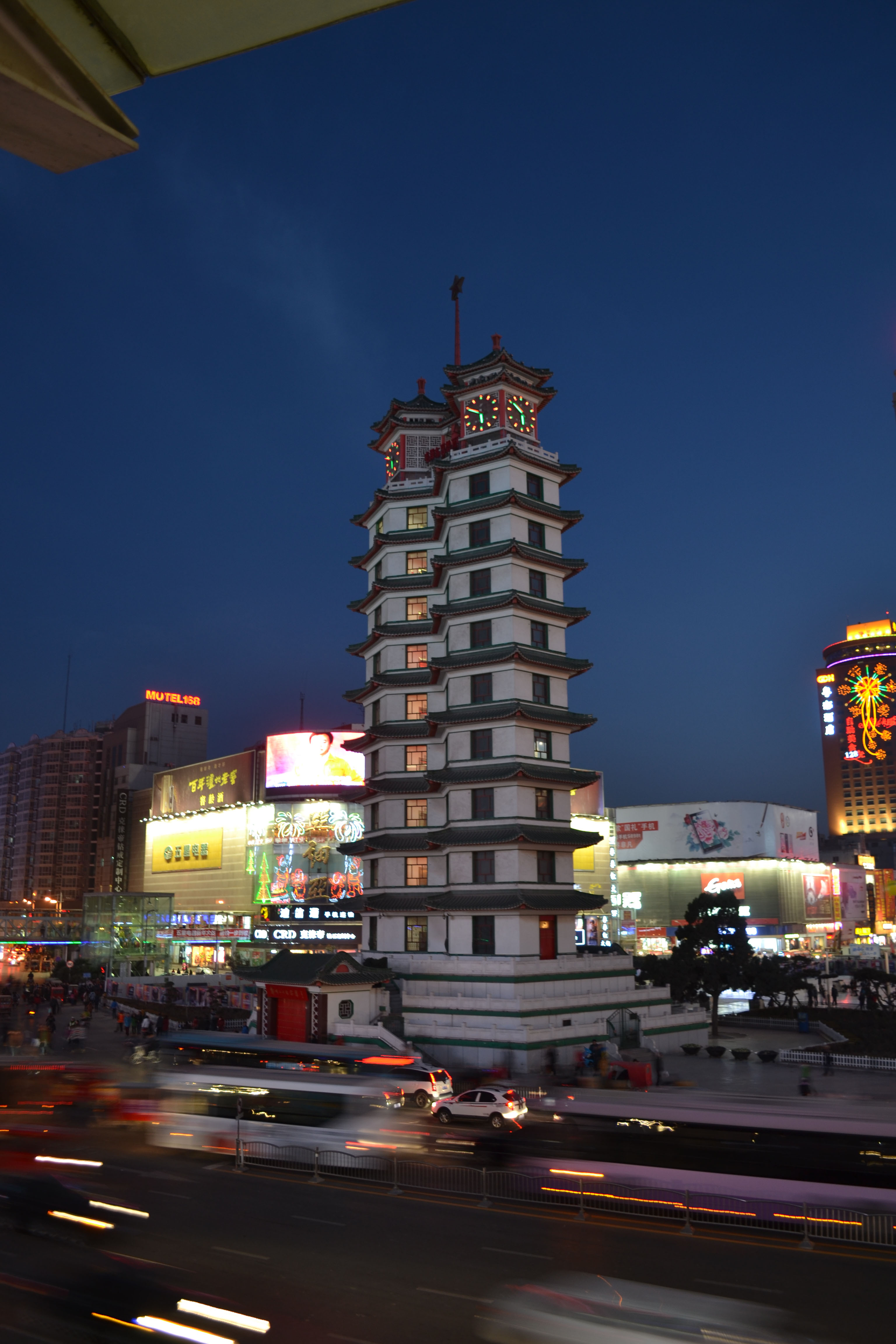 中文（中国大陆）: 郑州市二七区二七塔